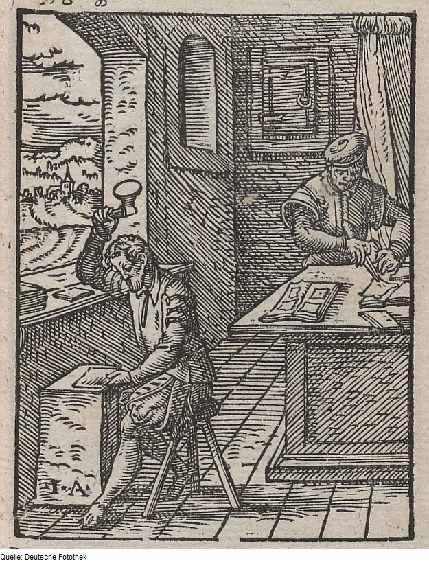 Original image description from the Deutsche Fotothek Ständebuch & Handwerk & Goldschläger & Blechmacher & Plattenmacher